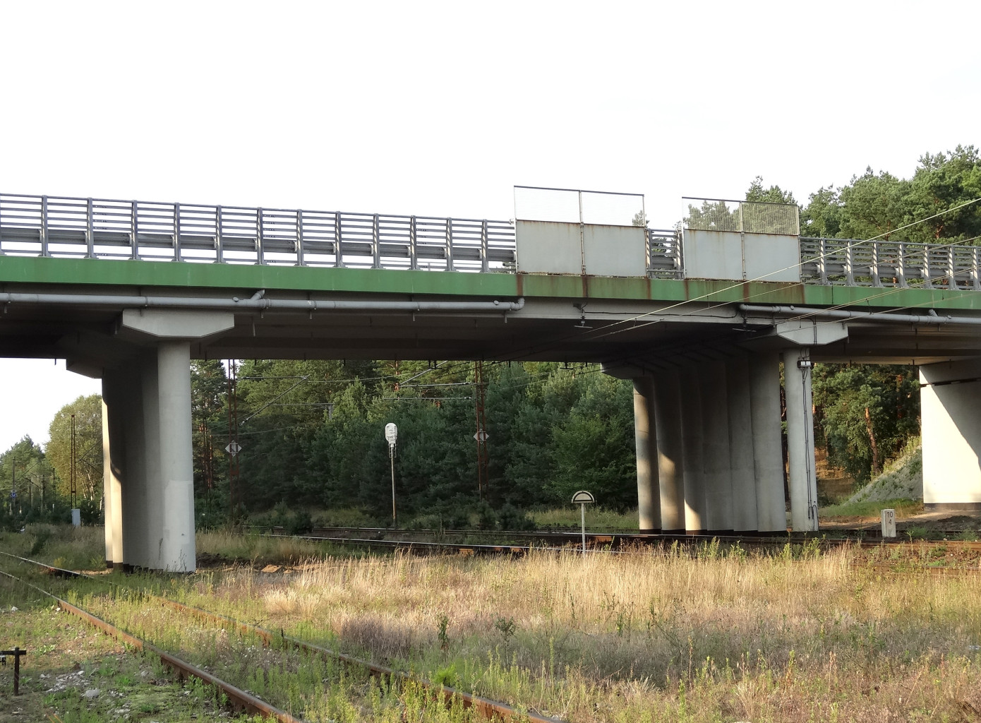 Wiadukt w ciągu drogi krajowej nr 10 Bydgoszcz-Toruń nad linią kolejową nr 201 (magistralą węglową) w Emilianowie k. Bydgoszczy